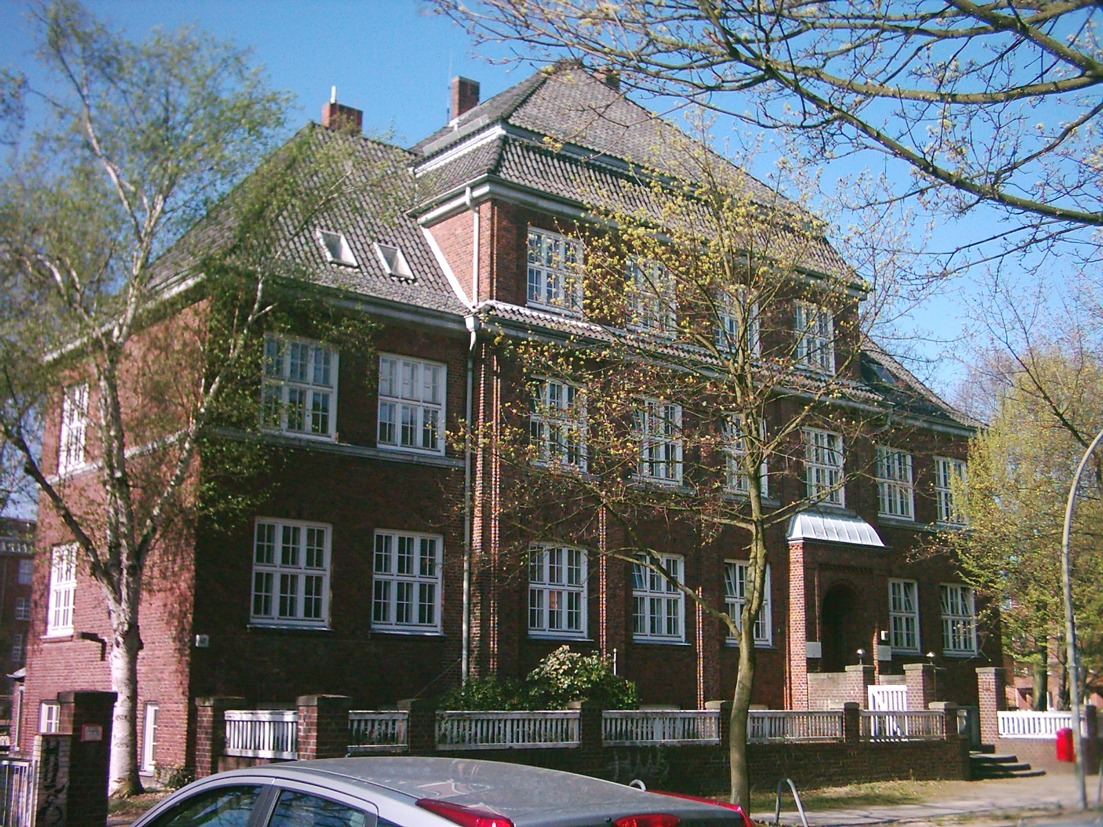 Finkenau 42, Geschäftsstelle folgender Institutionen: Hamburger Schulverein von 1875 e.V. Arbeitsgemeinschaft Hamburger Schullandheime e.V. Verein für Ferienkolonien von 1904 e.V. Hamburger Jugenderholungsheim Puan Klent auf Sylt. Siehe auch Image:Hamburger Schulverein Finkenau 004.jpg.